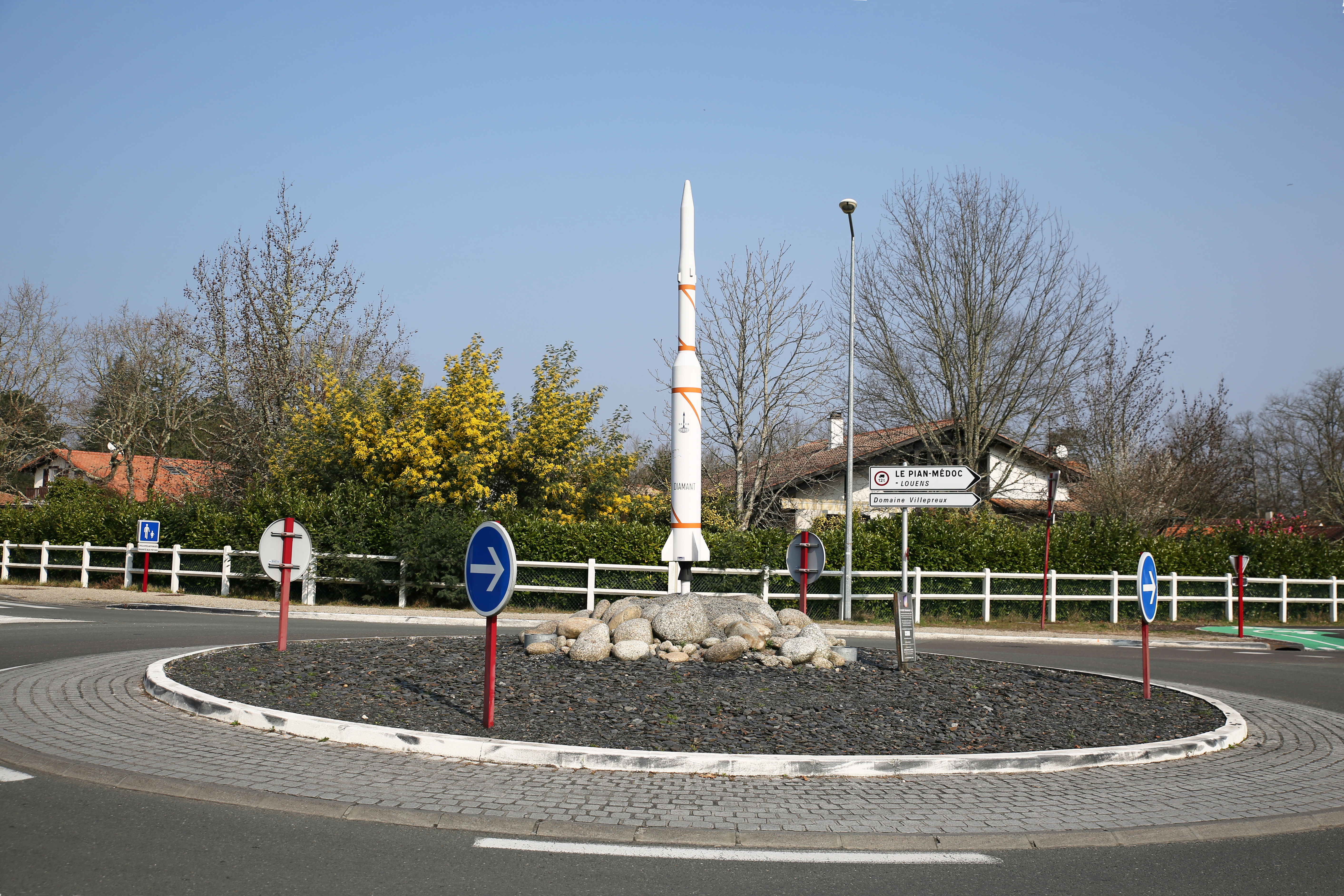 Giratoire avec une maquette de la fusée Diamant